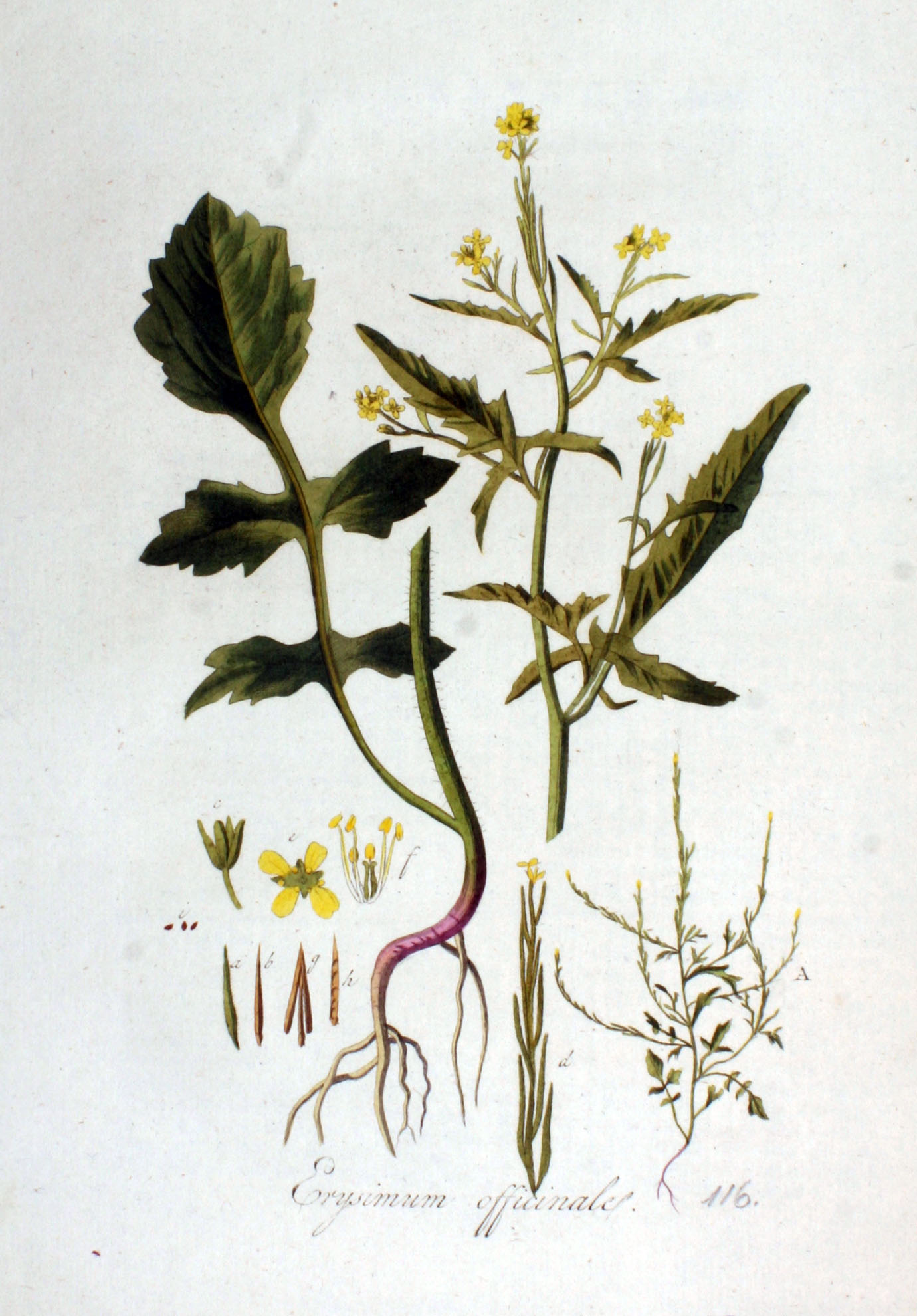 Sisymbrium officinale (L.) Scop. (Syn. Erysimum officinale L.)